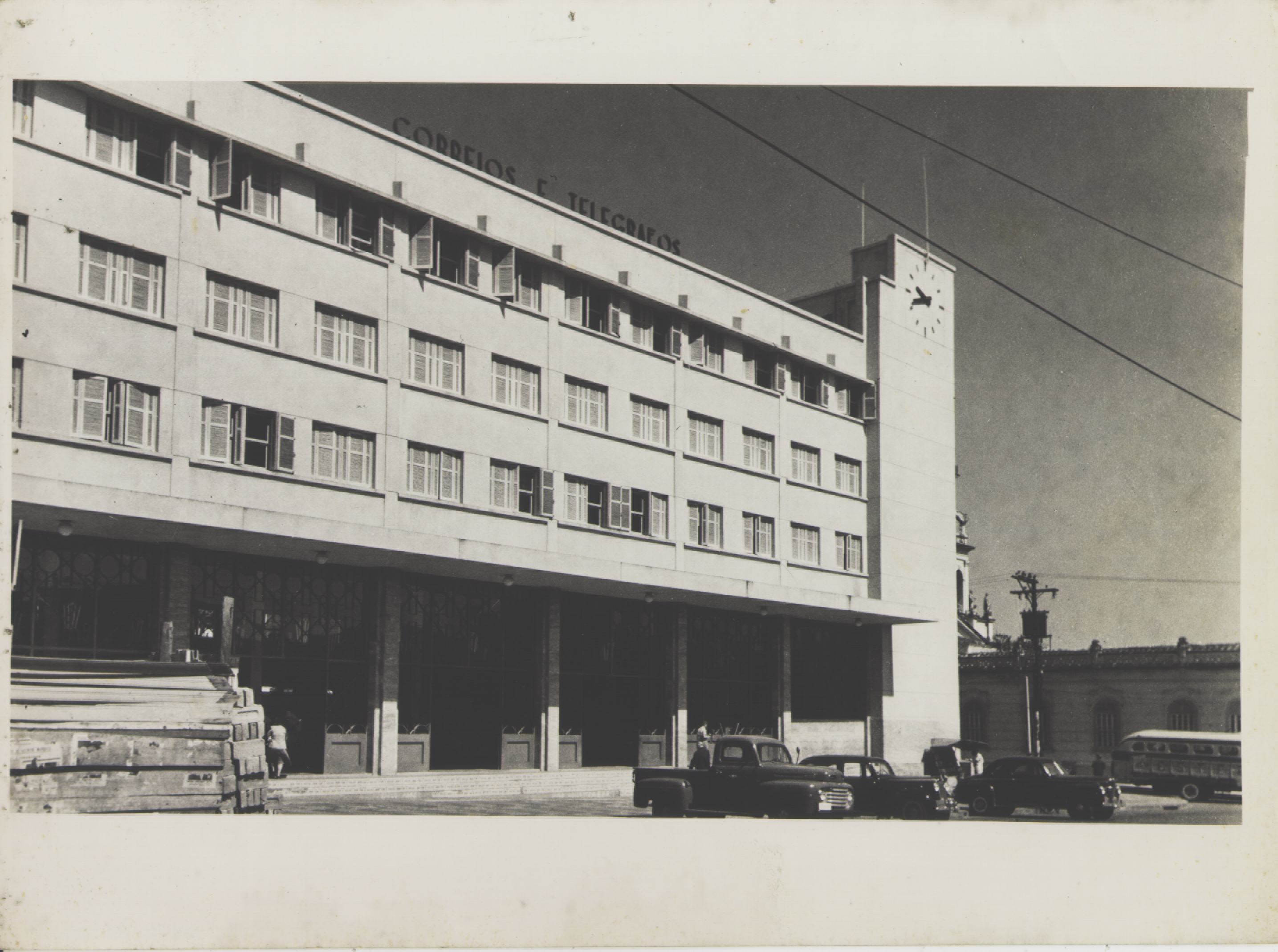 Obra que integra o acervo do Museu Paulista da USP. Coleção Werner Haberkorn